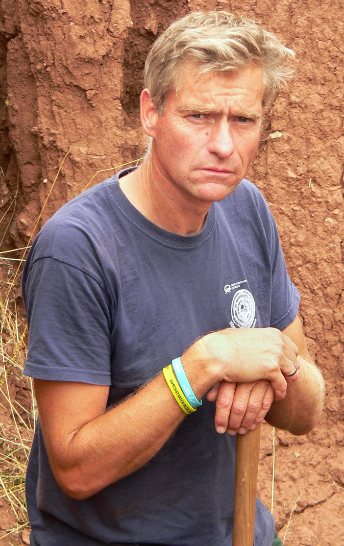 Immo Heske bei Ausgrabungsarbeiten an der Hünenburg bei Watenstedt